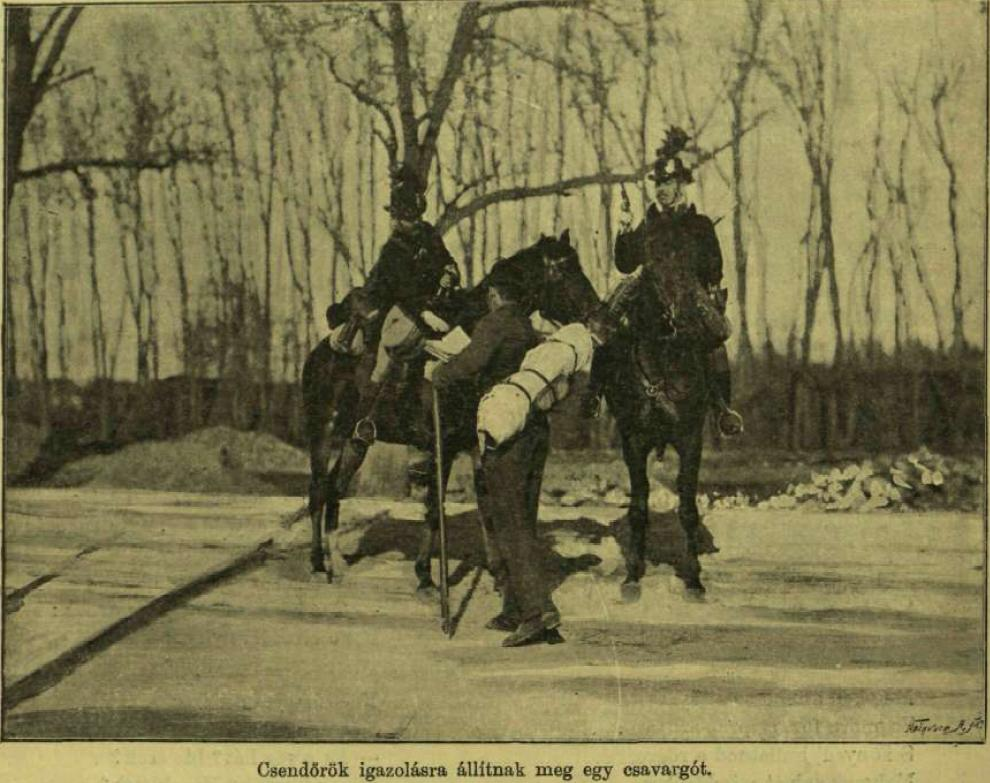 Magyar királyi lovas csendőrök csavargót állítanak meg